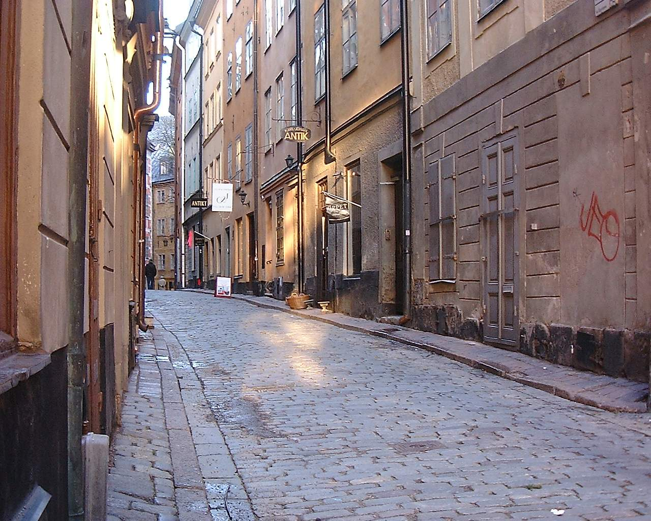 Kindstugatan in February 2007.